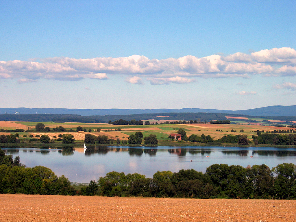 Seeburger See